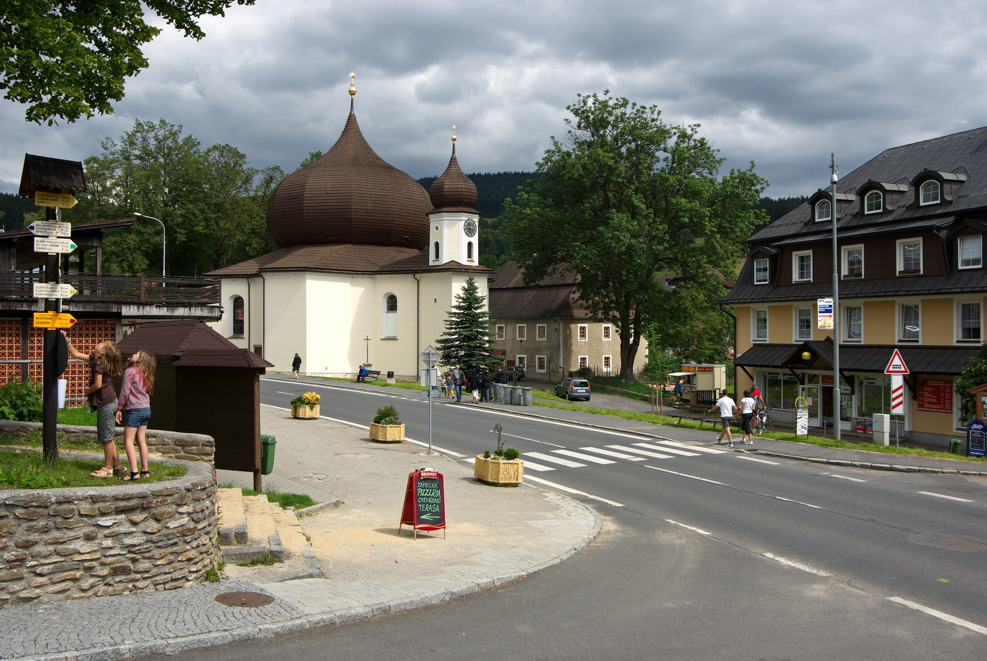 Železná Ruda, kostel Panny Marie Pomocné, okres Klatovy